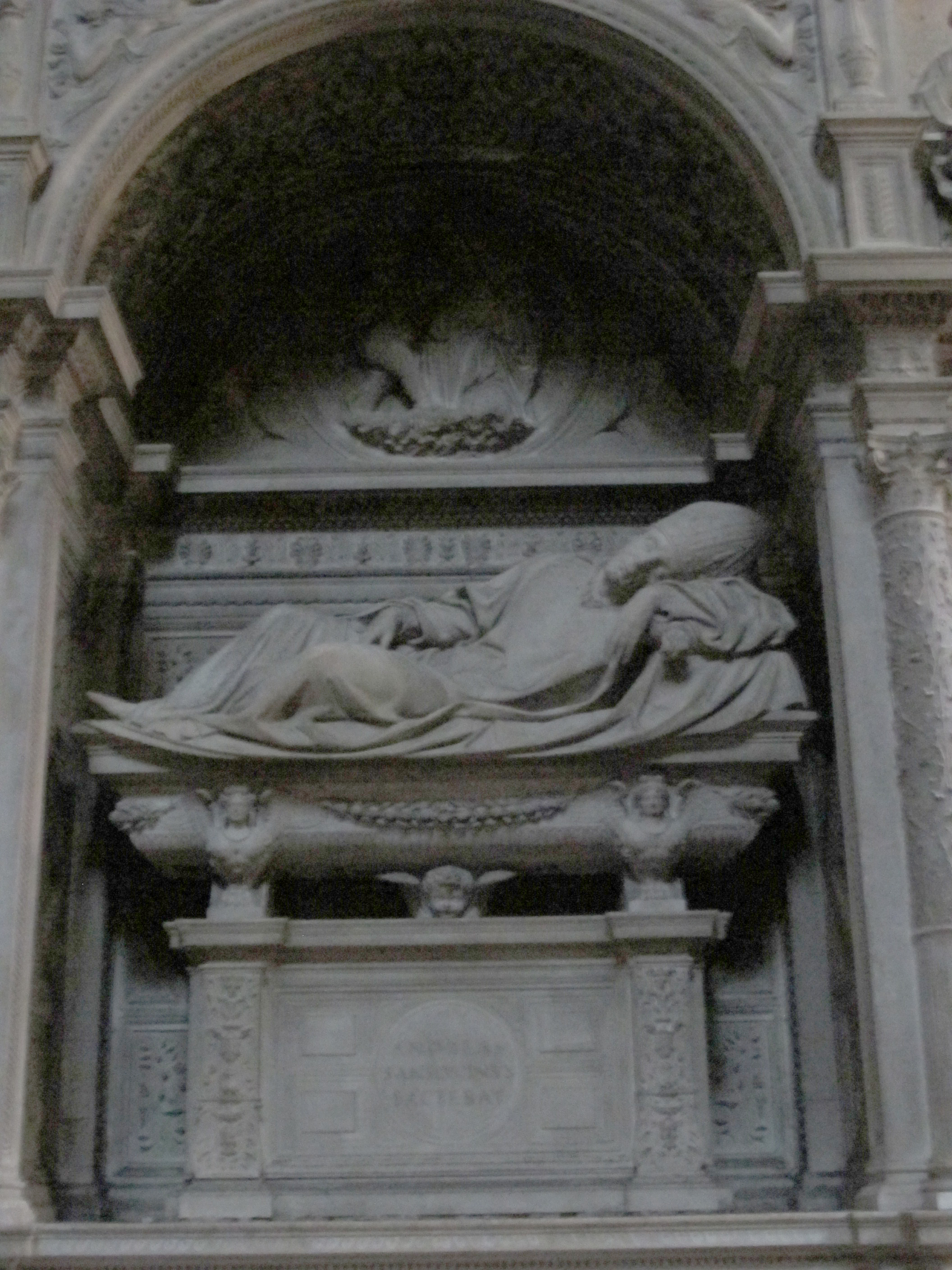 Sansovino, monumento funebre di girolamo basso della rovere